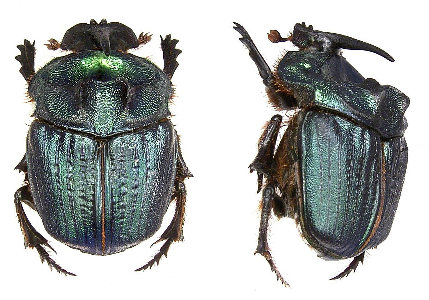 Familie: Scarabaeidae Grösse: 26-36 mm Verbreitung: Argentinien, Bolivien, Paraguay Fundort: Argentinien, Santiago del Estero, 1981 Foto: U.Schmidt, 2006